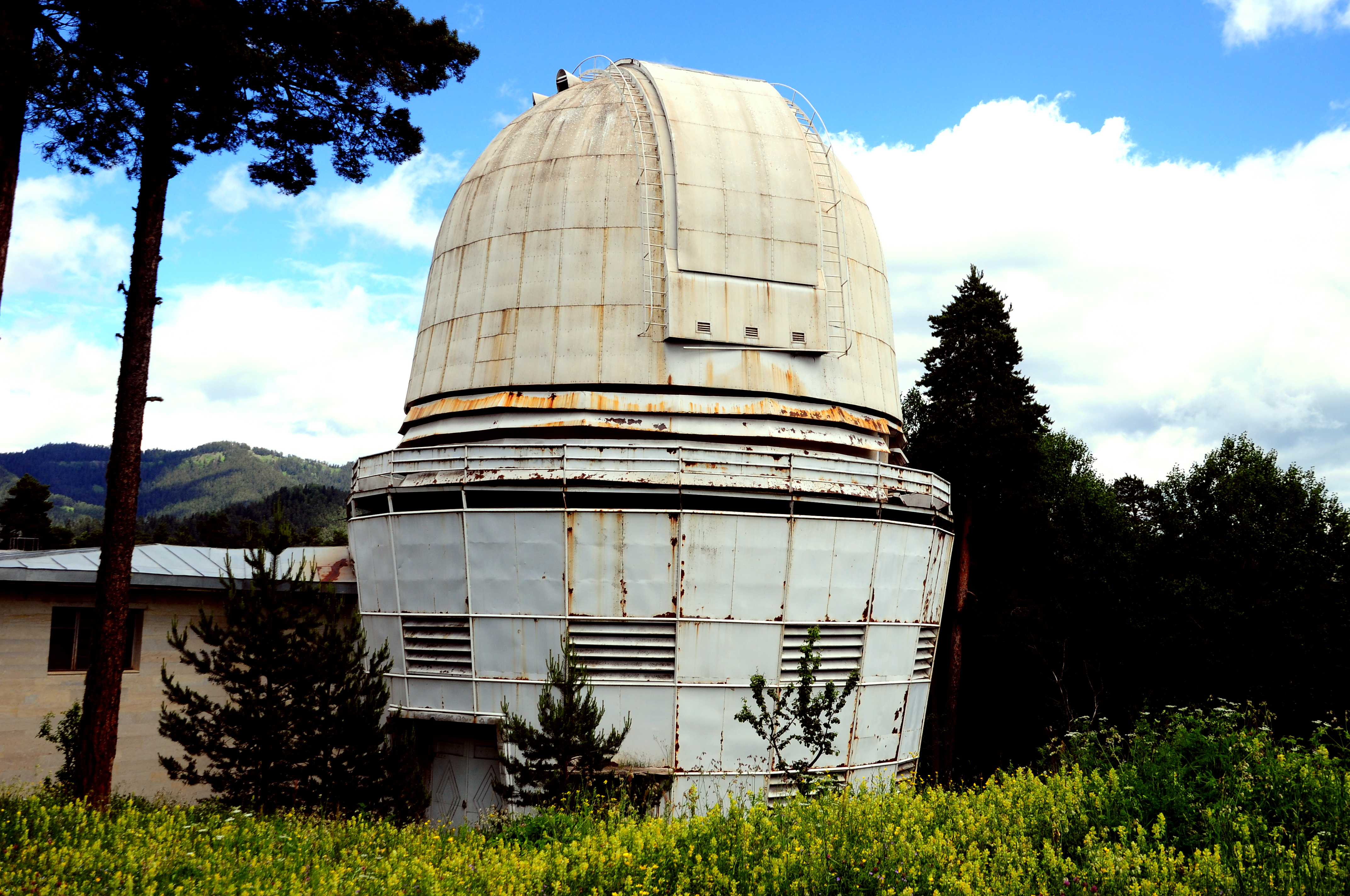 18500 Abastumani